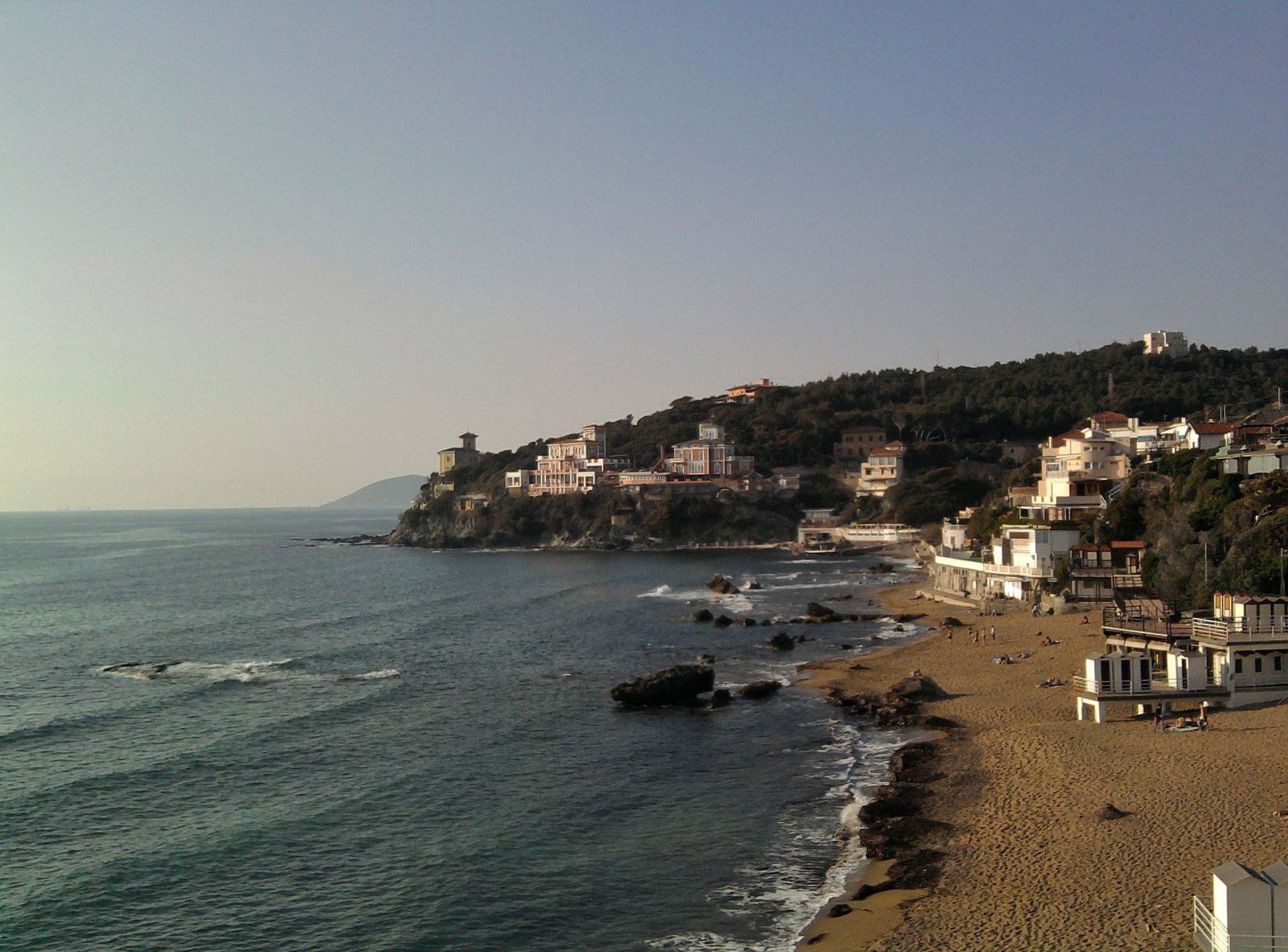 La spiaggia di Castiglioncello (LI) verso il Quercetano; sullo sfondo, in lontananza oltre i villini, la costa livornese del Romito